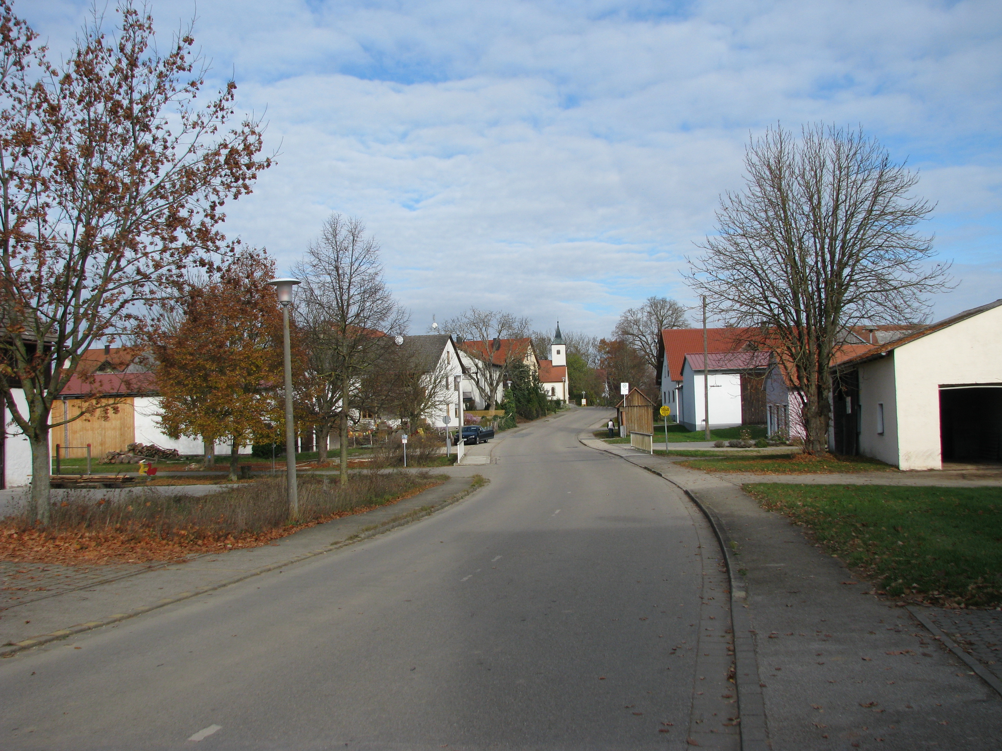 Lay, Ortsteil von Hilpoltstein im mittelfränkischen Landkreis Roth